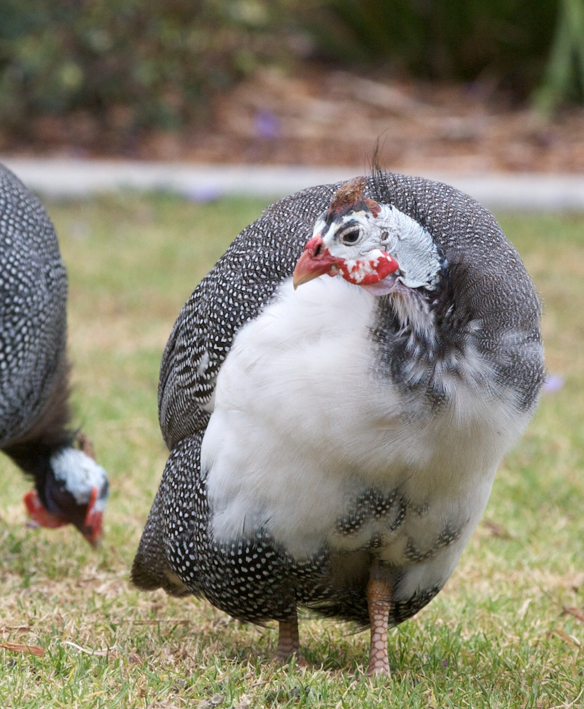 Numida meleagris